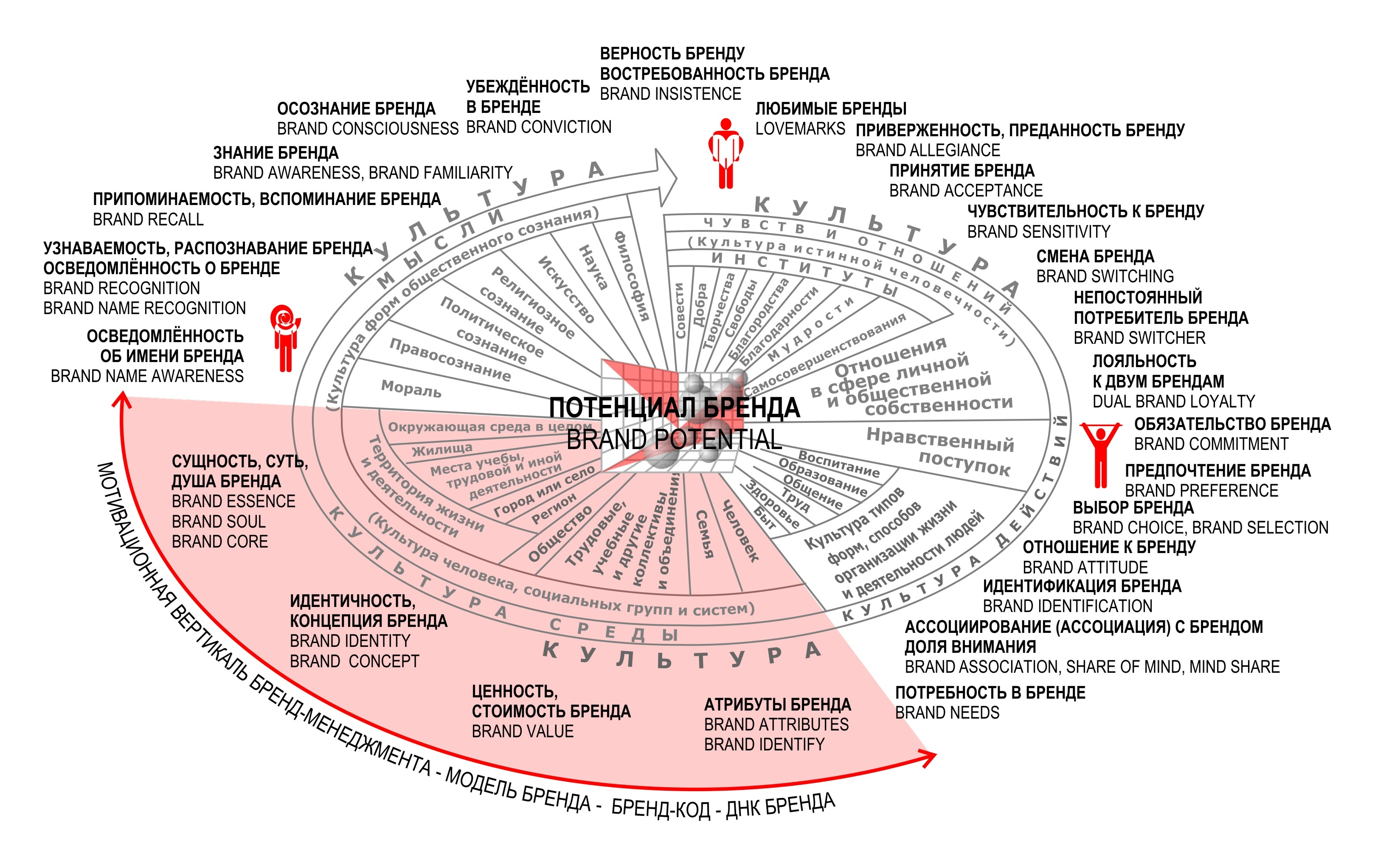 Модель поведения при выборе бренда (brand choice behaviour) в системе культуры Л. В. Баньковского. Для статьи "Лояльность к бренду"